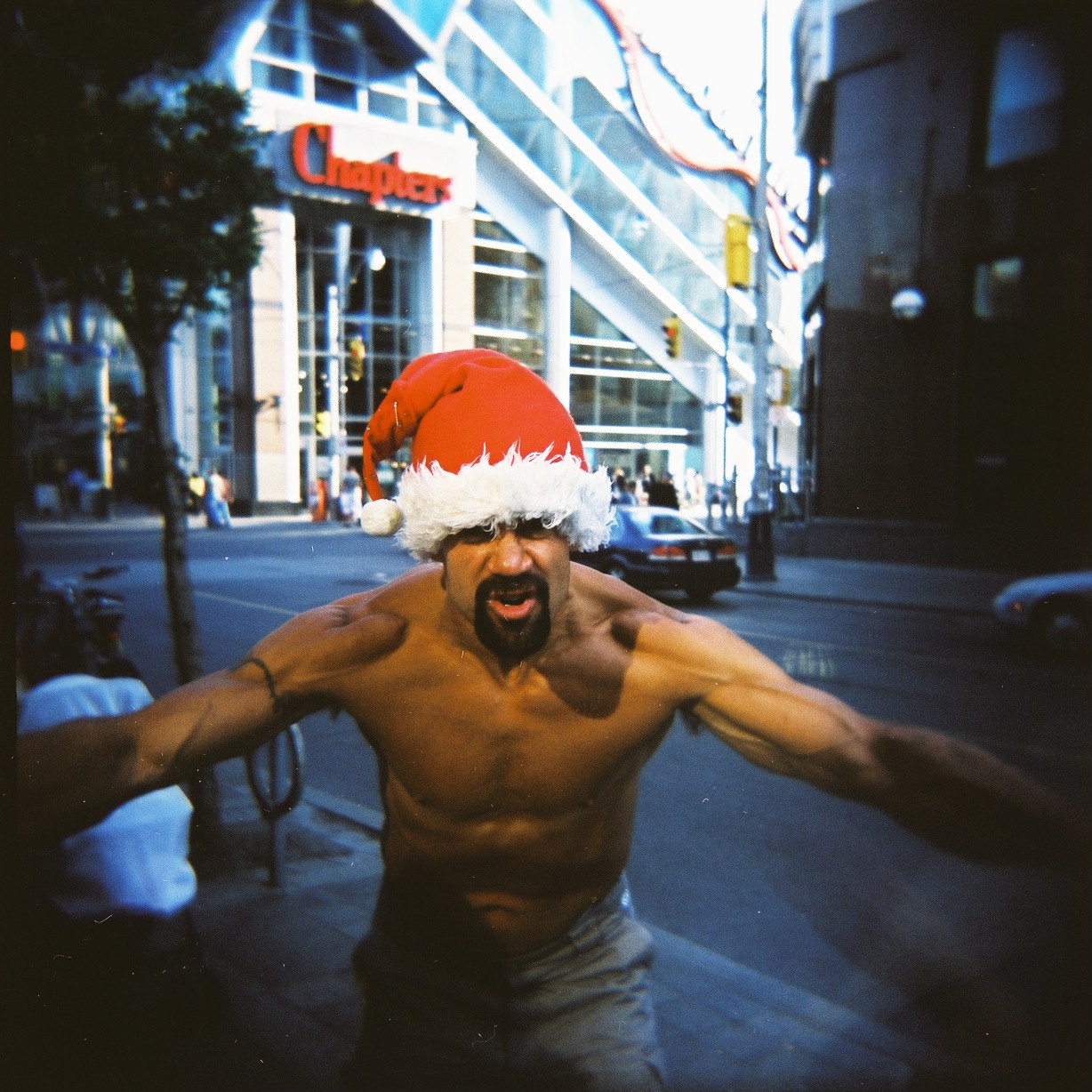 David "Zanta" Zancai